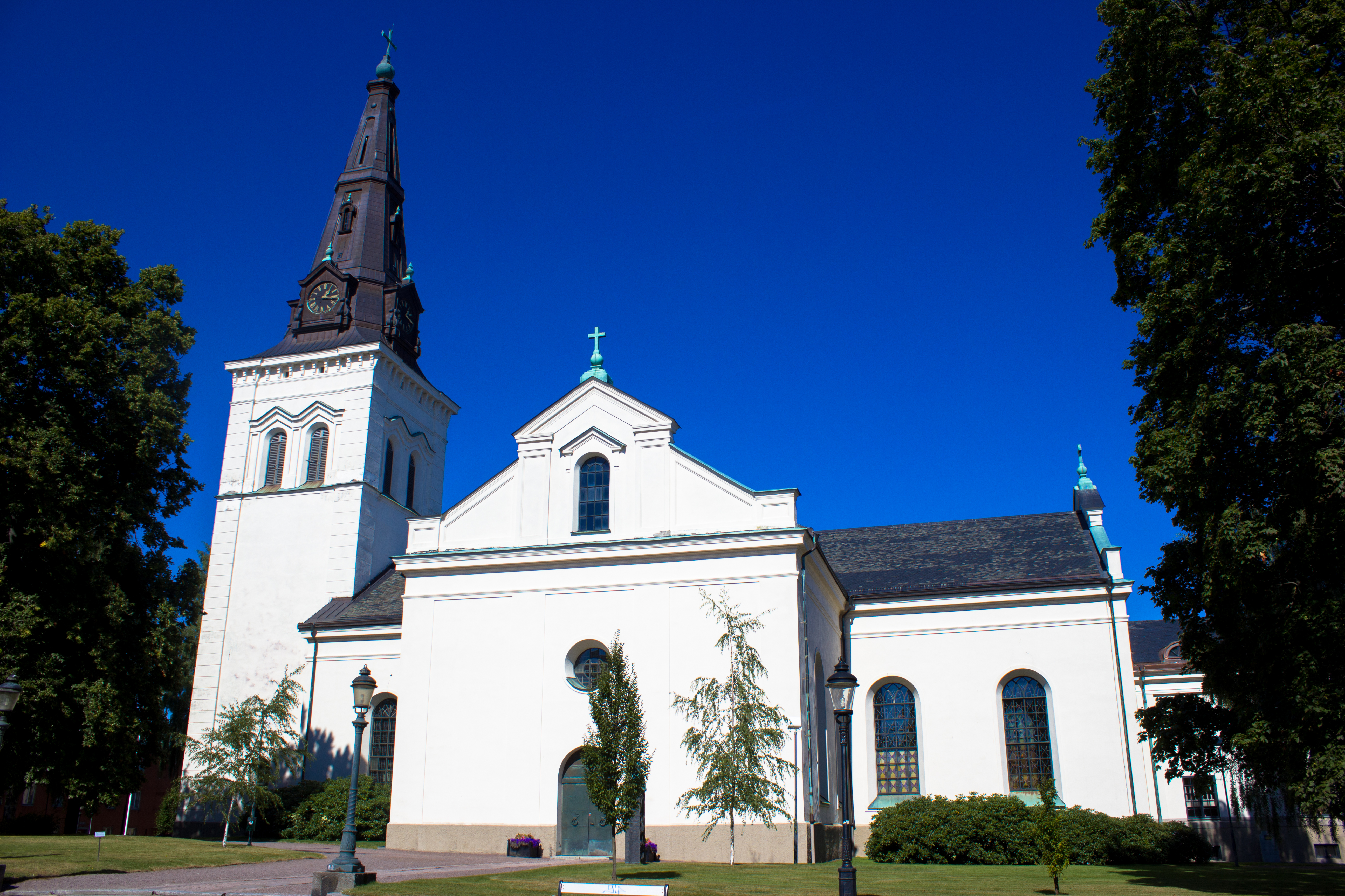 Catedral de Karlstad, Suecia.